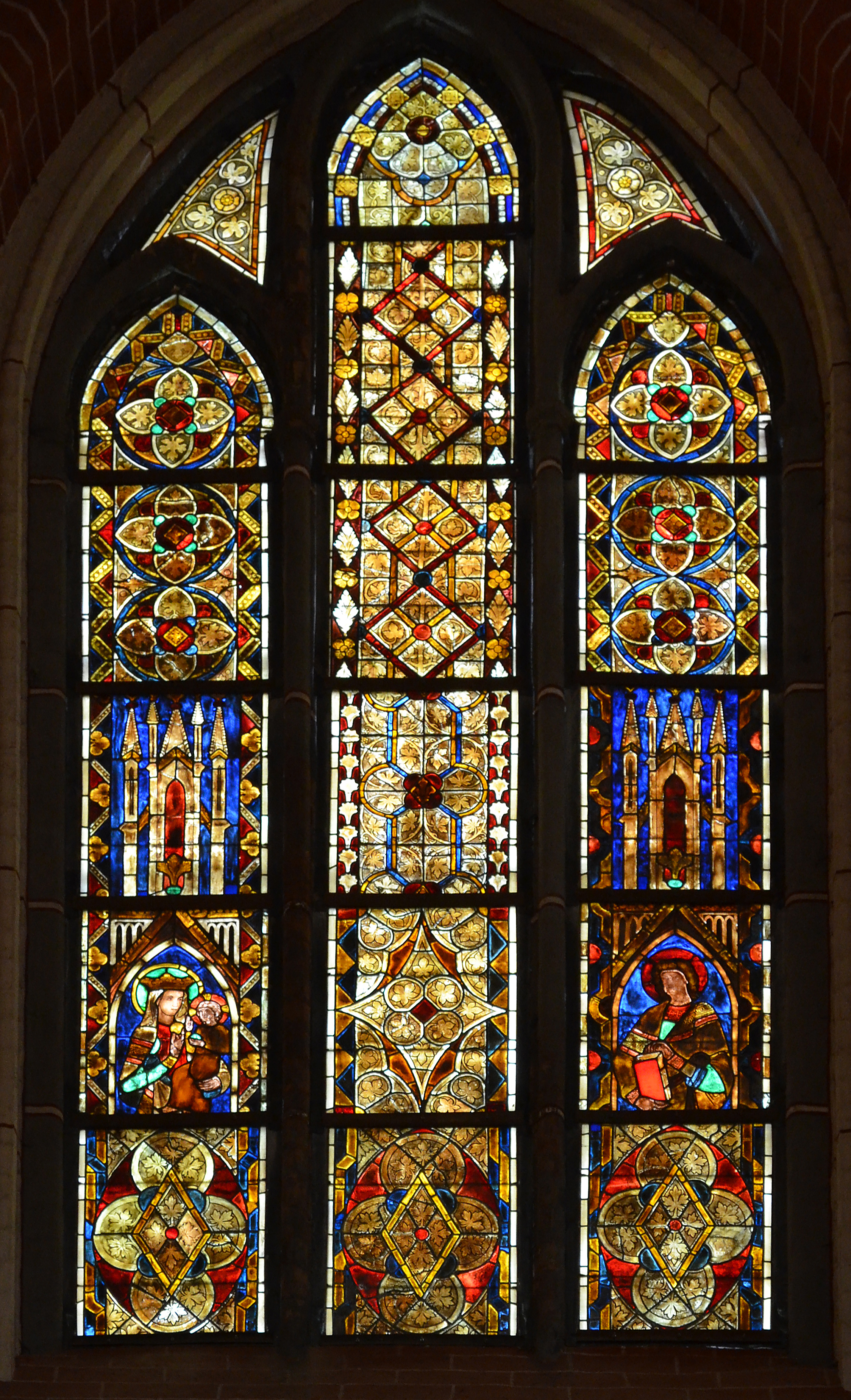 Kirchenfenster im Münster, Bad Doberan, Germany